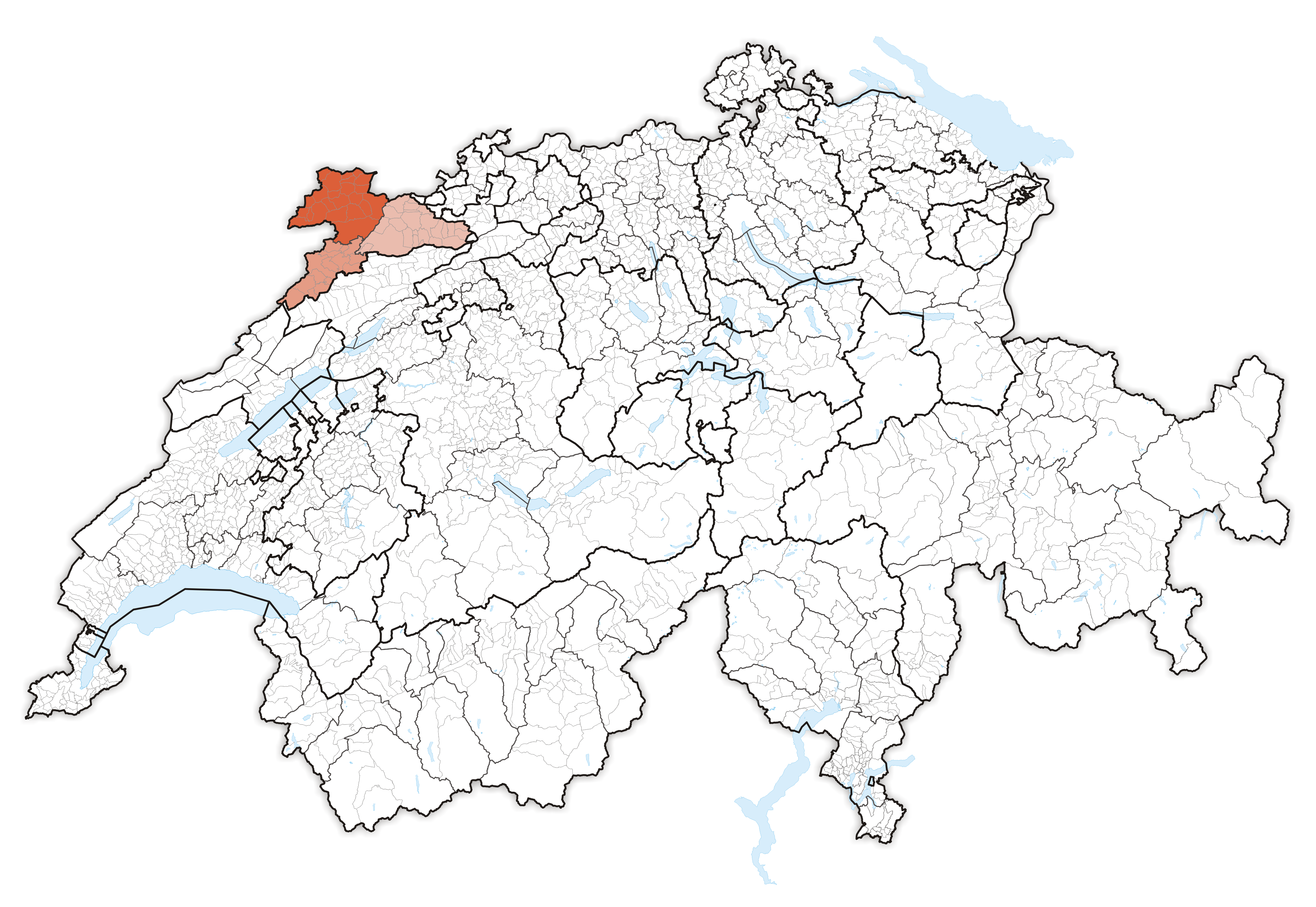 Canton Jura